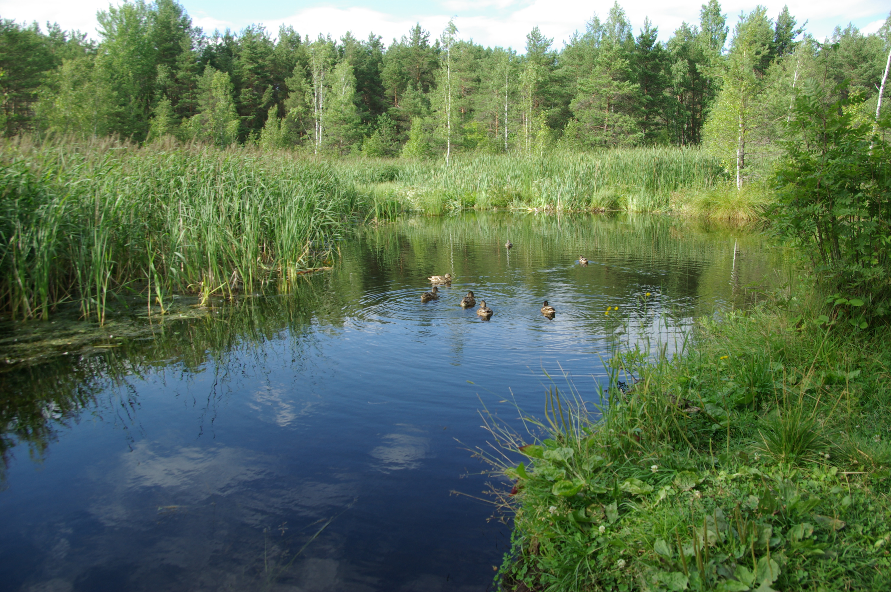 Pääsküla raba on raba Tallinna piiril, Pääsküla ning Männiku asumi ja Männiku küla vahel.Tiik saab osa oma veest lähedal asuvatest allikatest,väiksema osa sademetest.